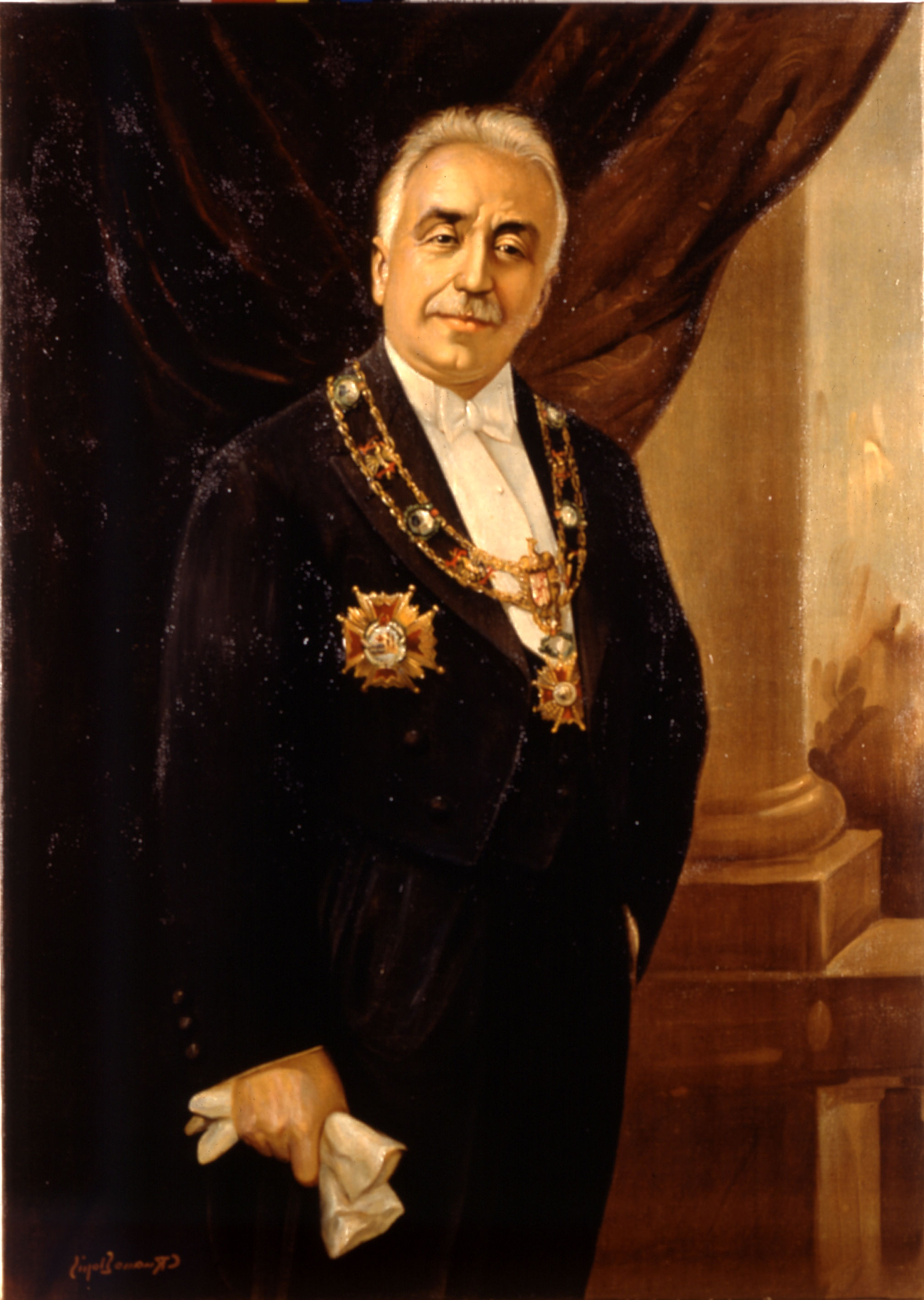 Retrato del presidente Niceto Alcalá Zamora y Torres